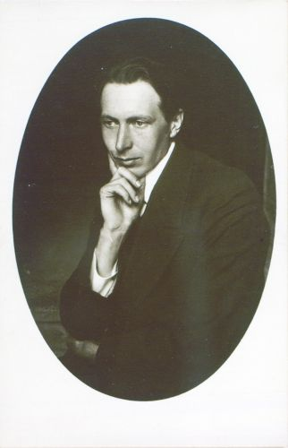 Fran Tratnik